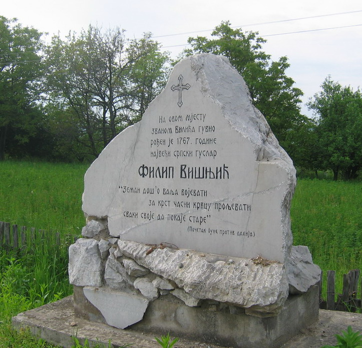 Спомен обиљежје у Горњој Трнови, на мјесту на коме је била родна кућа Филипа Вишњића. Спомен обиљежје је подигнуто новембра 1994. године. Аутори: Милан Уљмански и Дејан Марковић